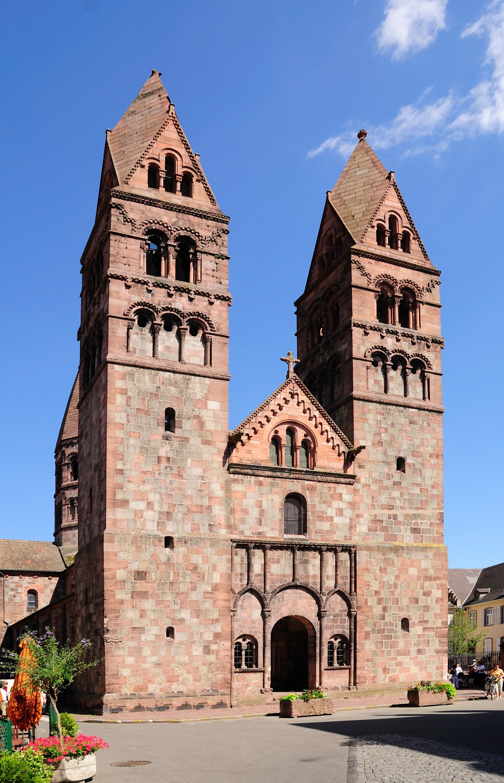 Église Sainte-Foy Sélestat: Doppelturmfassade